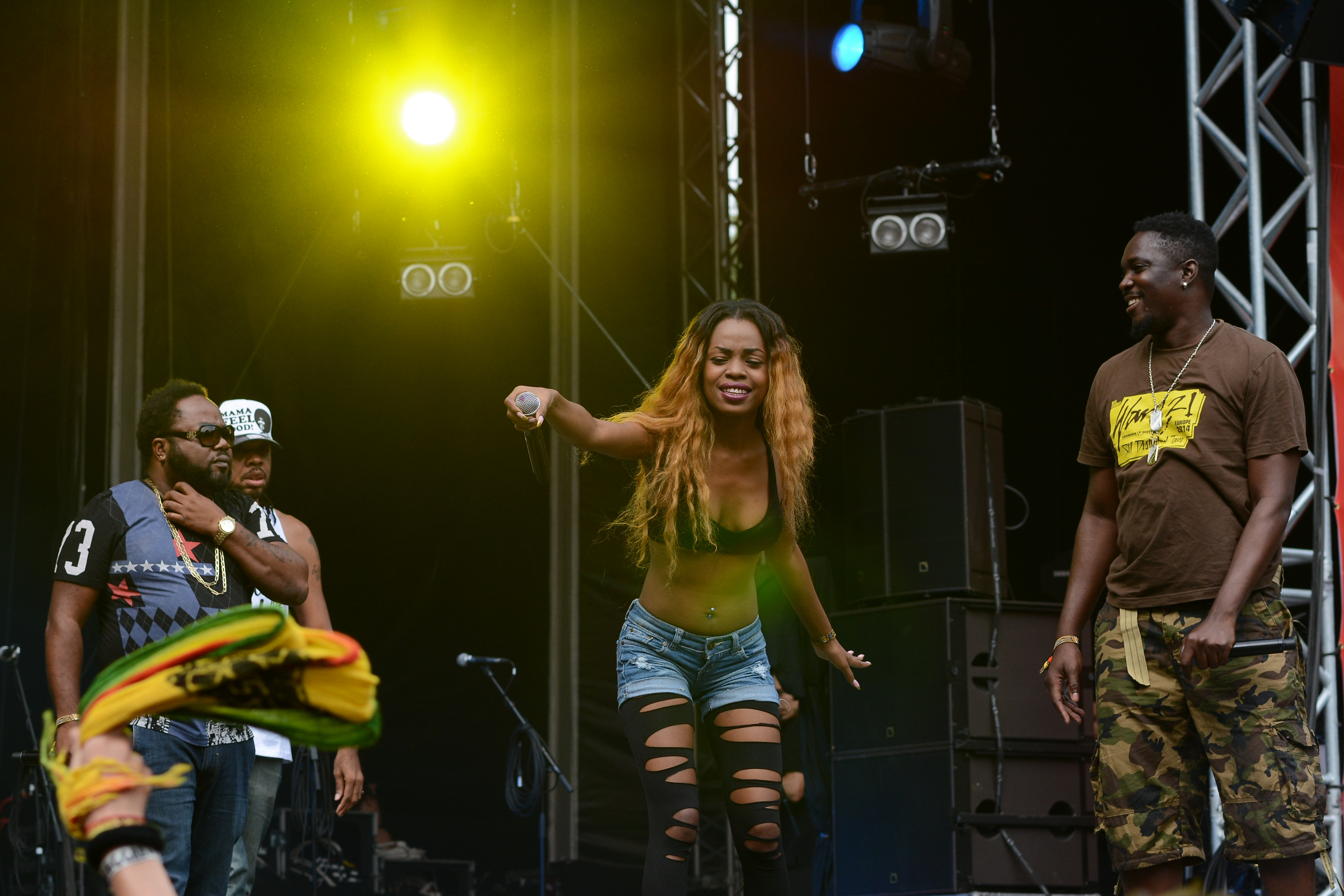 Ward 21 beim Ruhr Reggae Summer in Mülheim